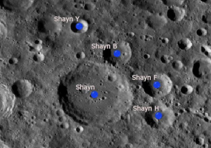 Cráter lunar Shayn. Cráteres satélite. (Imagen LRO)